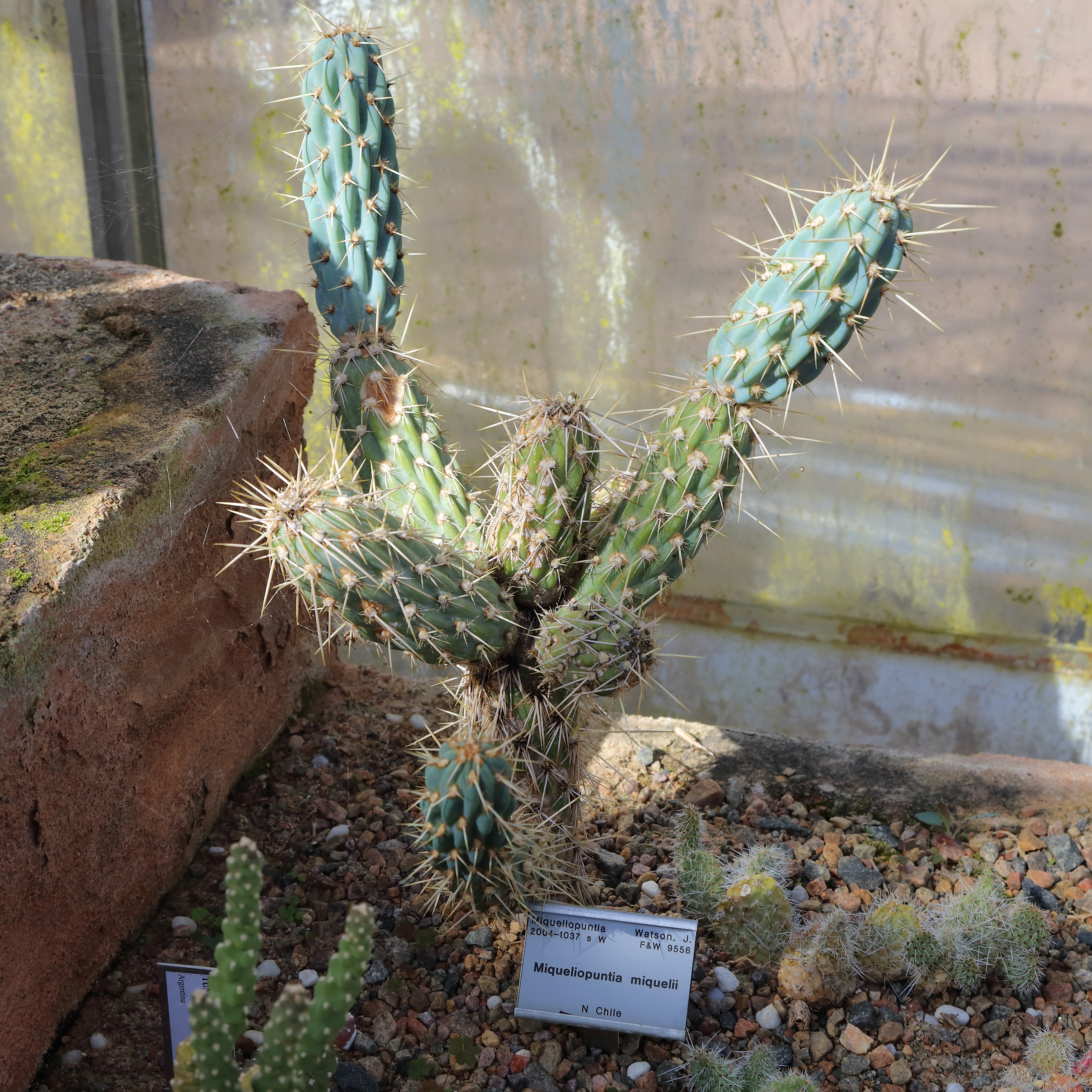 Miqueliopuntia miquelii identifierad med hjälp av skylt i Göteborgs botaniska trädgård.